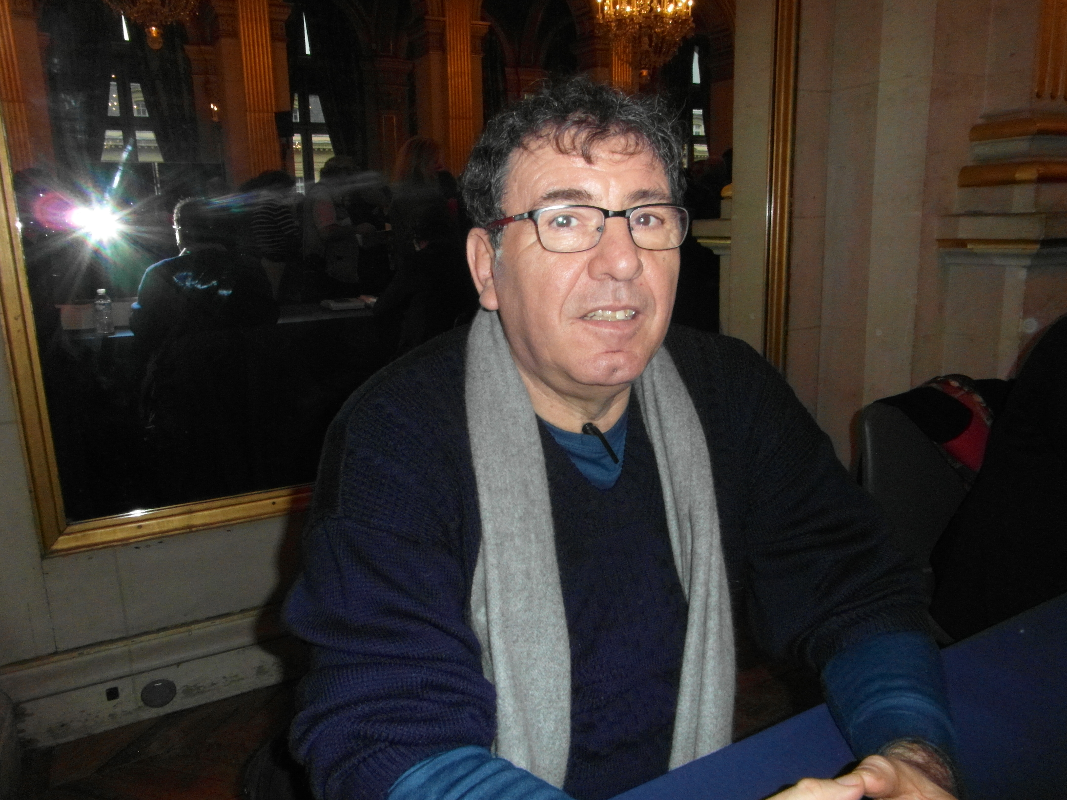 22e Maghreb des Livres, 13 et 14 février 2016